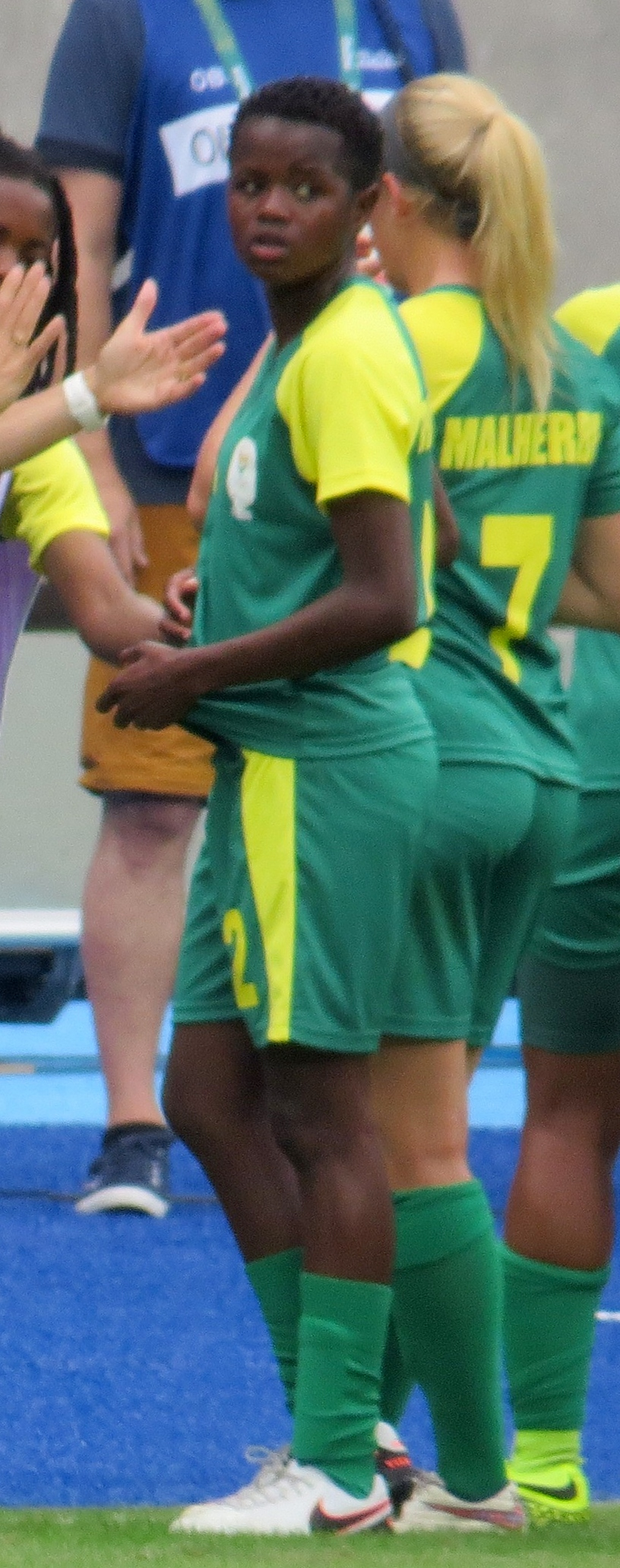 Futebol feminino Suécia 1 x0 Africa do Sul 03/08/16